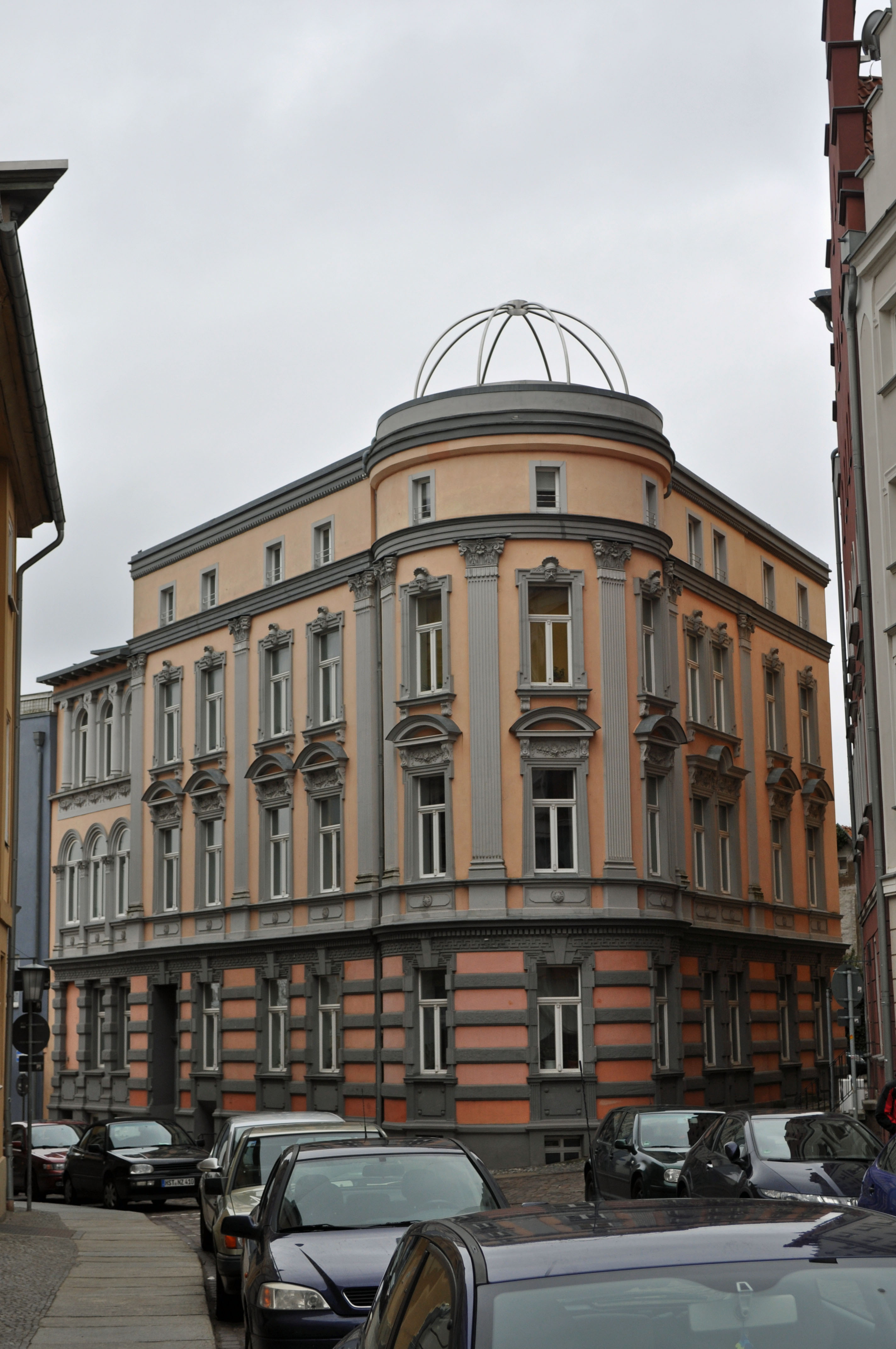 Gebäude bzw. Gebäudedetail in Stralsund. Straße und Hausnummer siehe Dateiname.